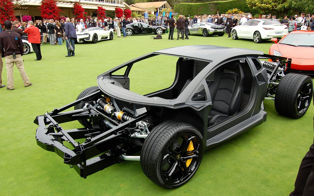 Lamborghini Aventador LP 700-4 chassis